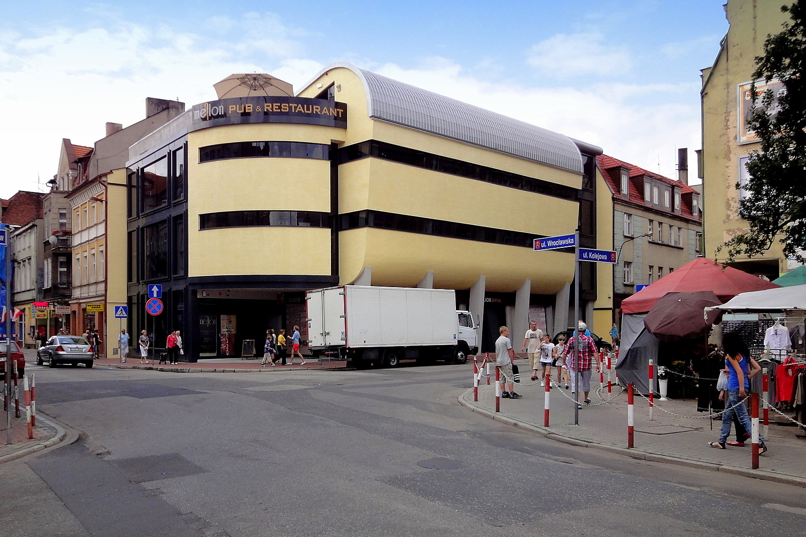 nowoczesny budynek usługowy u zbiegu ul. Wrocławskiej i ul. Kolejowej w Ostrowie Wlkp. Projekt: Pracownia Projektowa Artura Morysona z Wrocławia